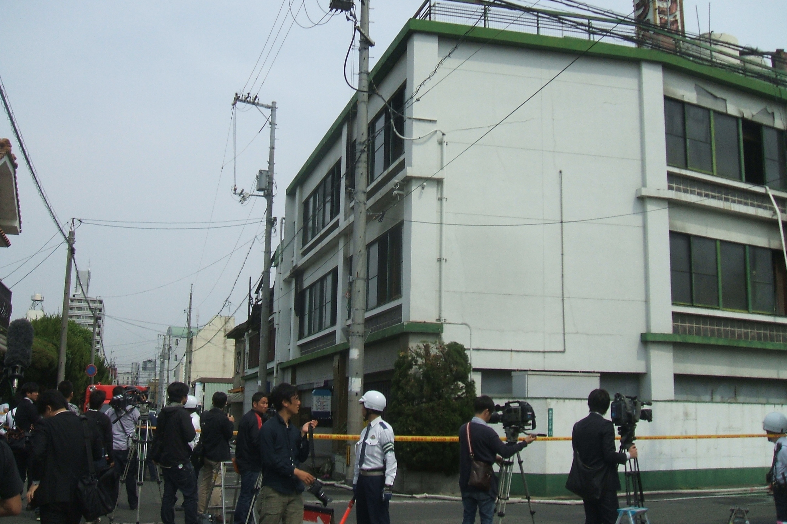 2012年5月13日に広島県福山市西桜町で発生したホテル火災現場を取材する報道陣